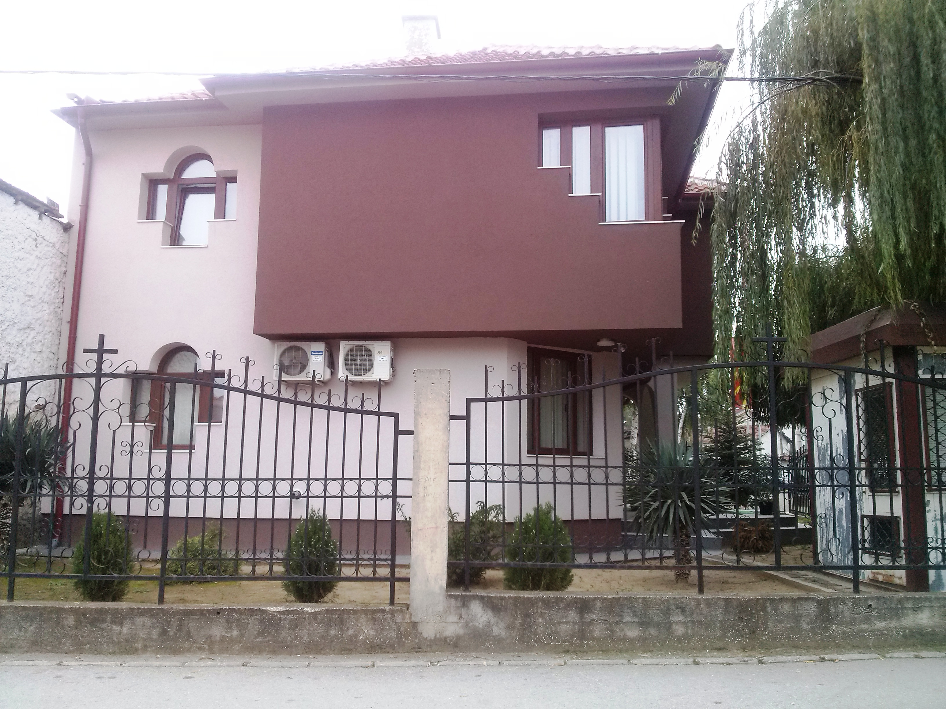 Црква „Св. Никола“, Куманово